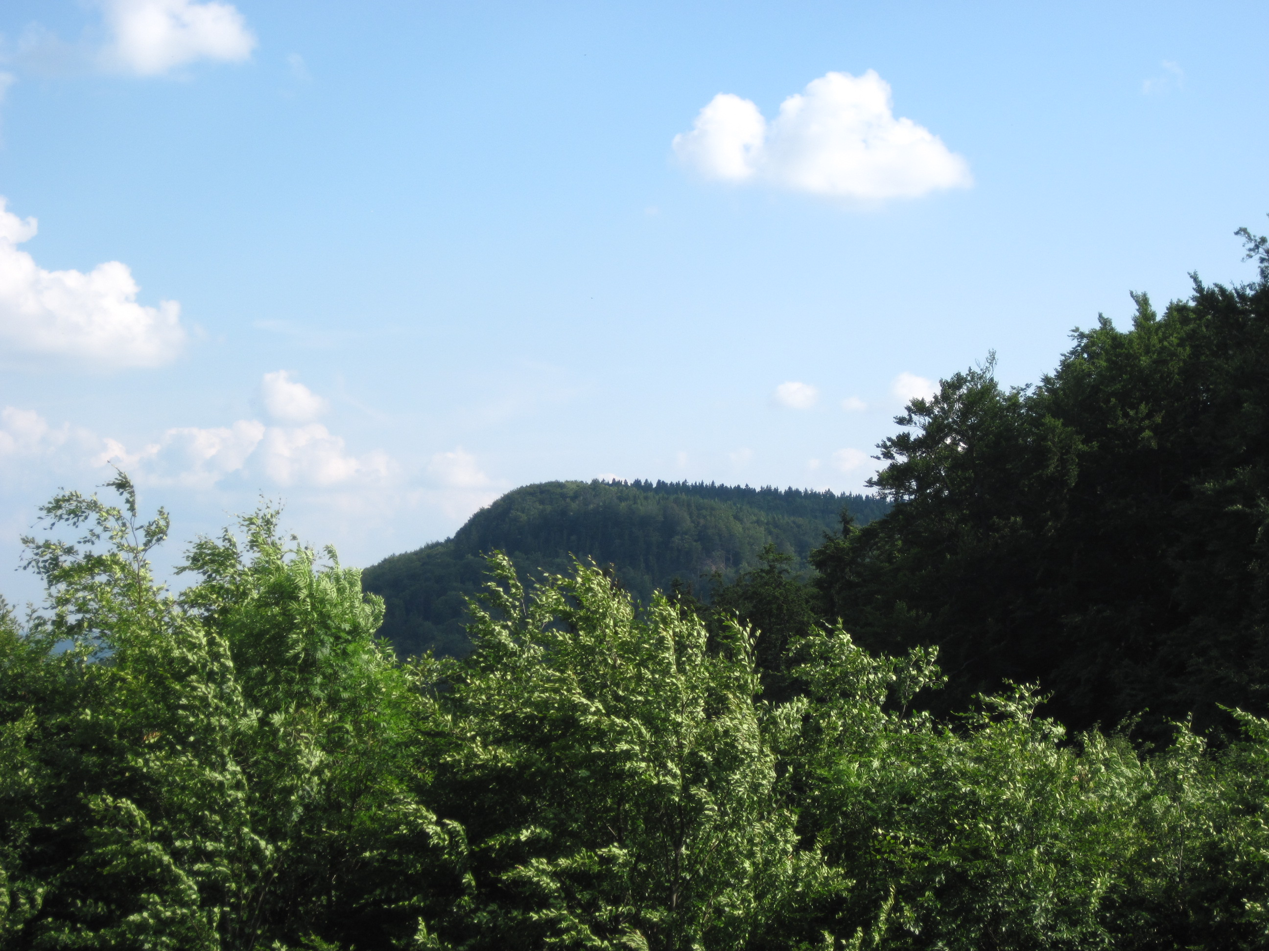 Project: Chráněná území.